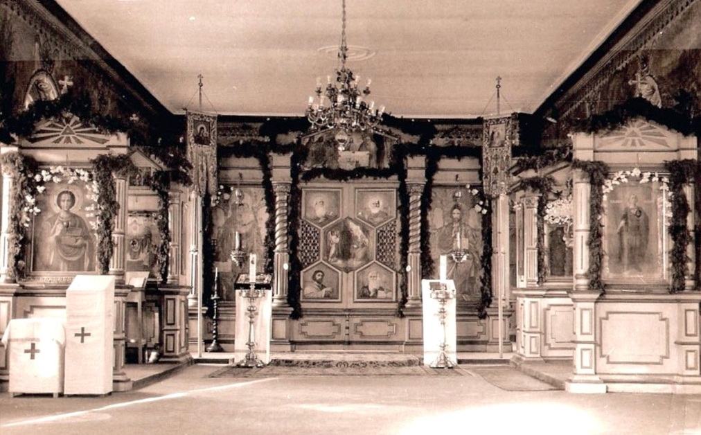 Внутренний вид Успенского храма в Пекине